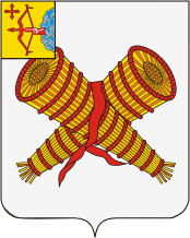 Герб города Слободского